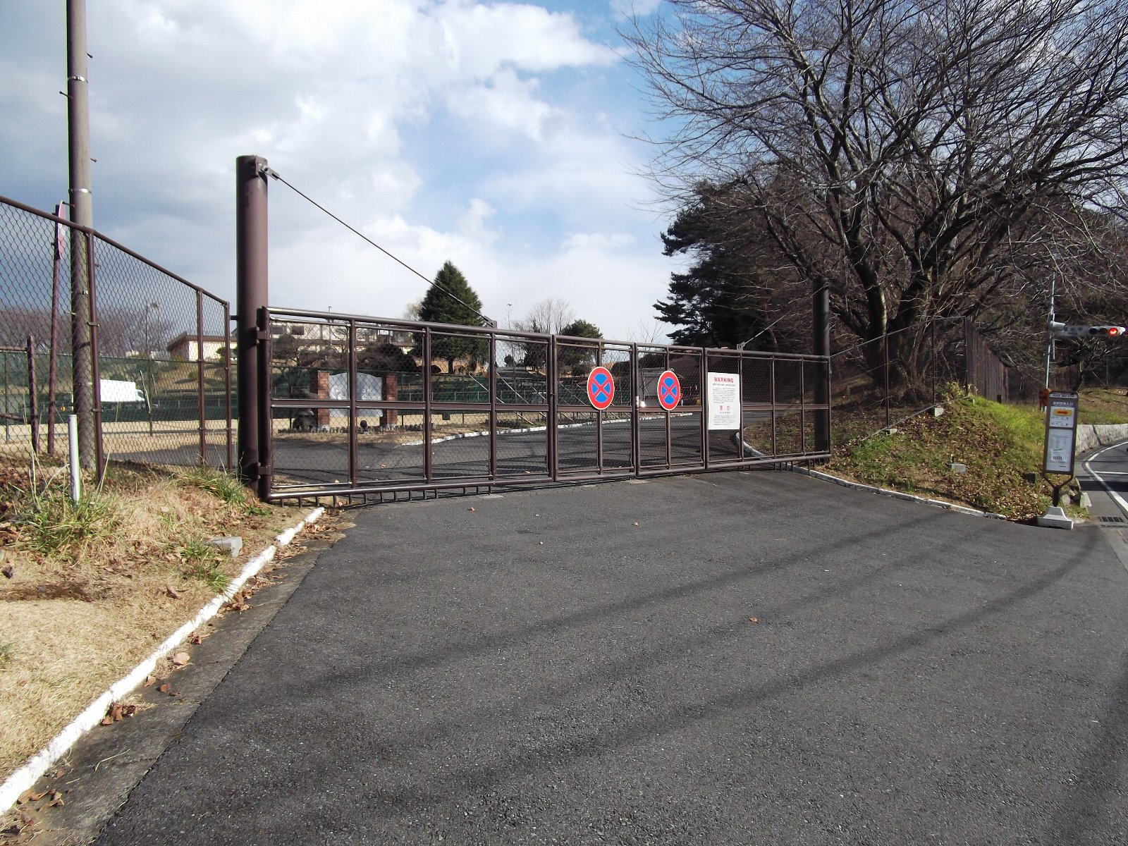 米軍多摩ゴルフ場出入口。東京都多摩市連光寺。